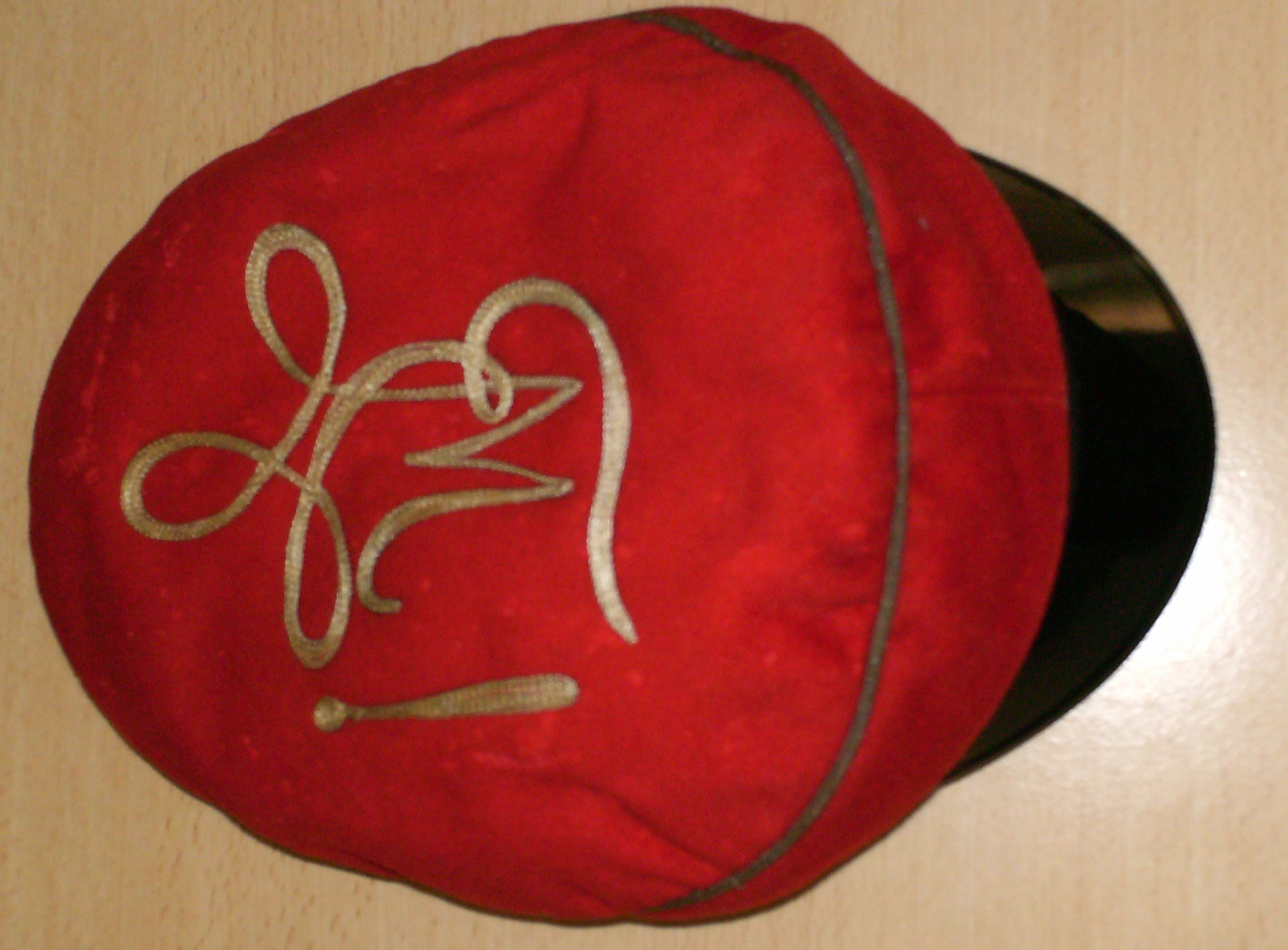 Schülermütze der Oberprima des Andreas-Realgymnasiums in Hildesheim, ca. 1930